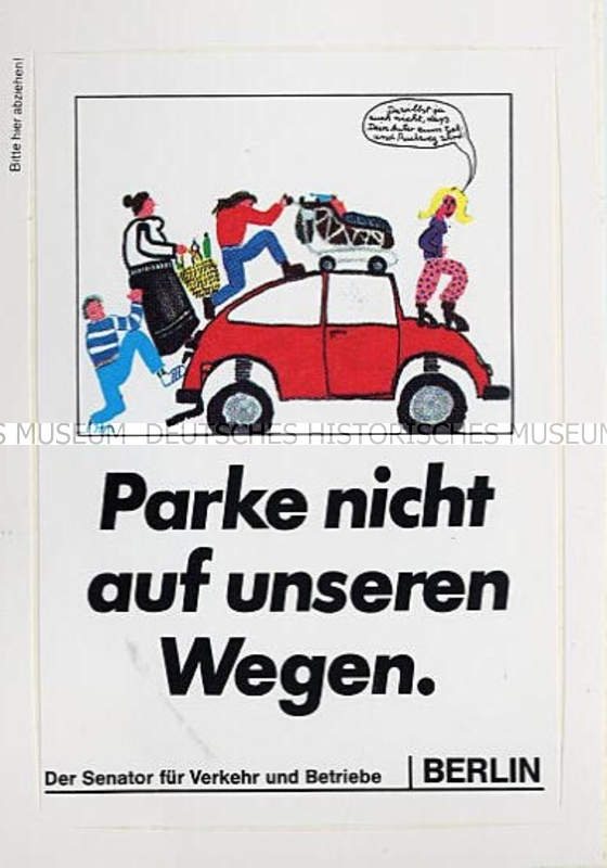 This image is in the public domain according to German copyright law because it is part of a statute, ordinance, official decree or judgment (official work) issued by a German authority or court (§ 5 Abs.1 UrhG).